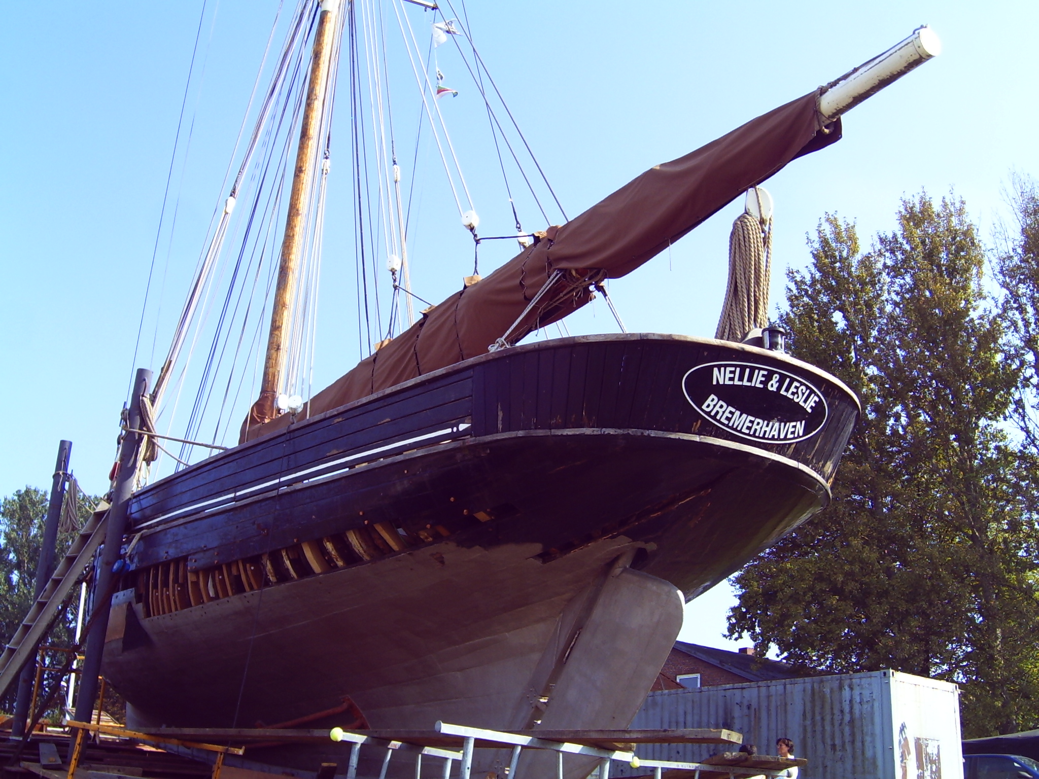 Nellie & Leslie, ein ehemaliger englischer Kutter